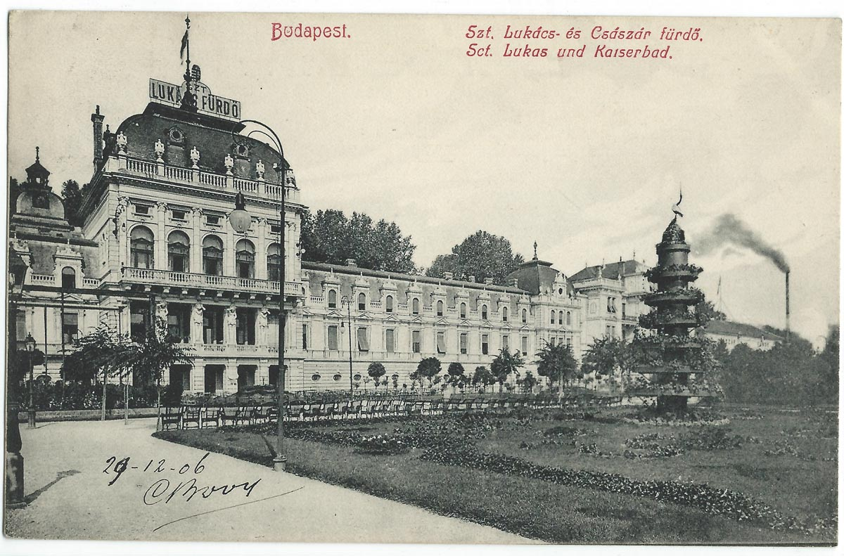 Vue de Budapest au début du XXe siècle.